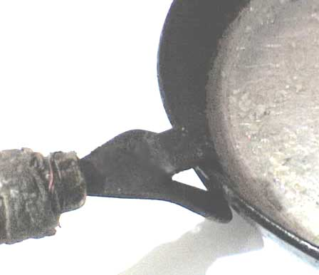 Чапельник, Сковородник